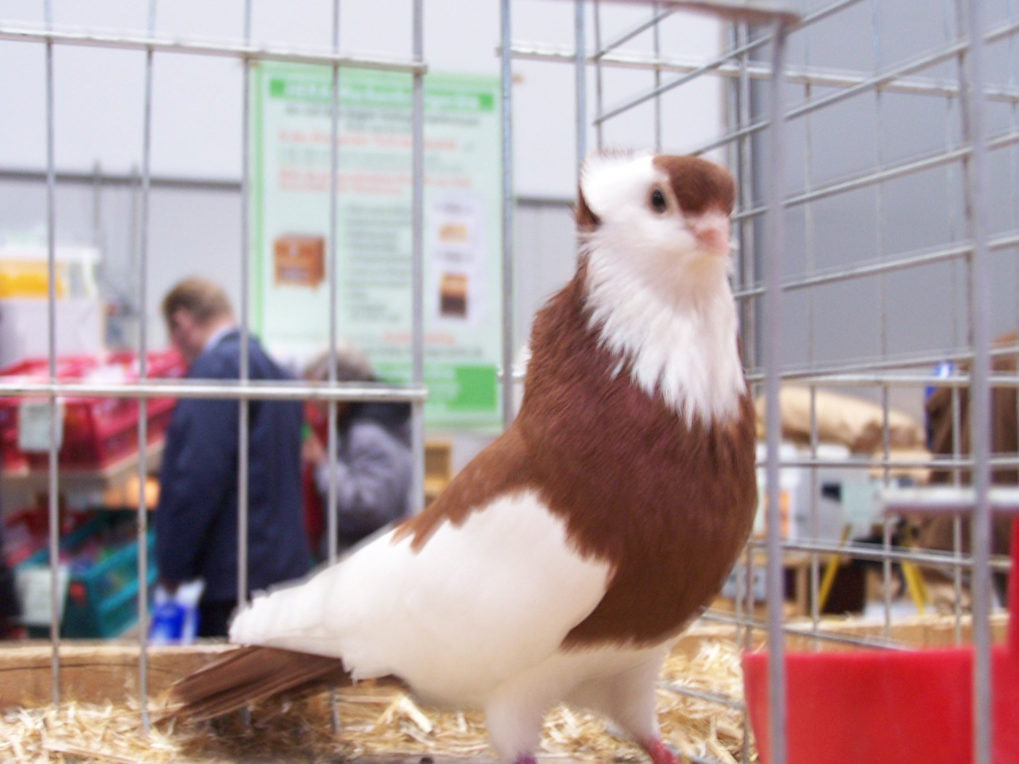 Felegyhazer tuimelaar rood geekstert